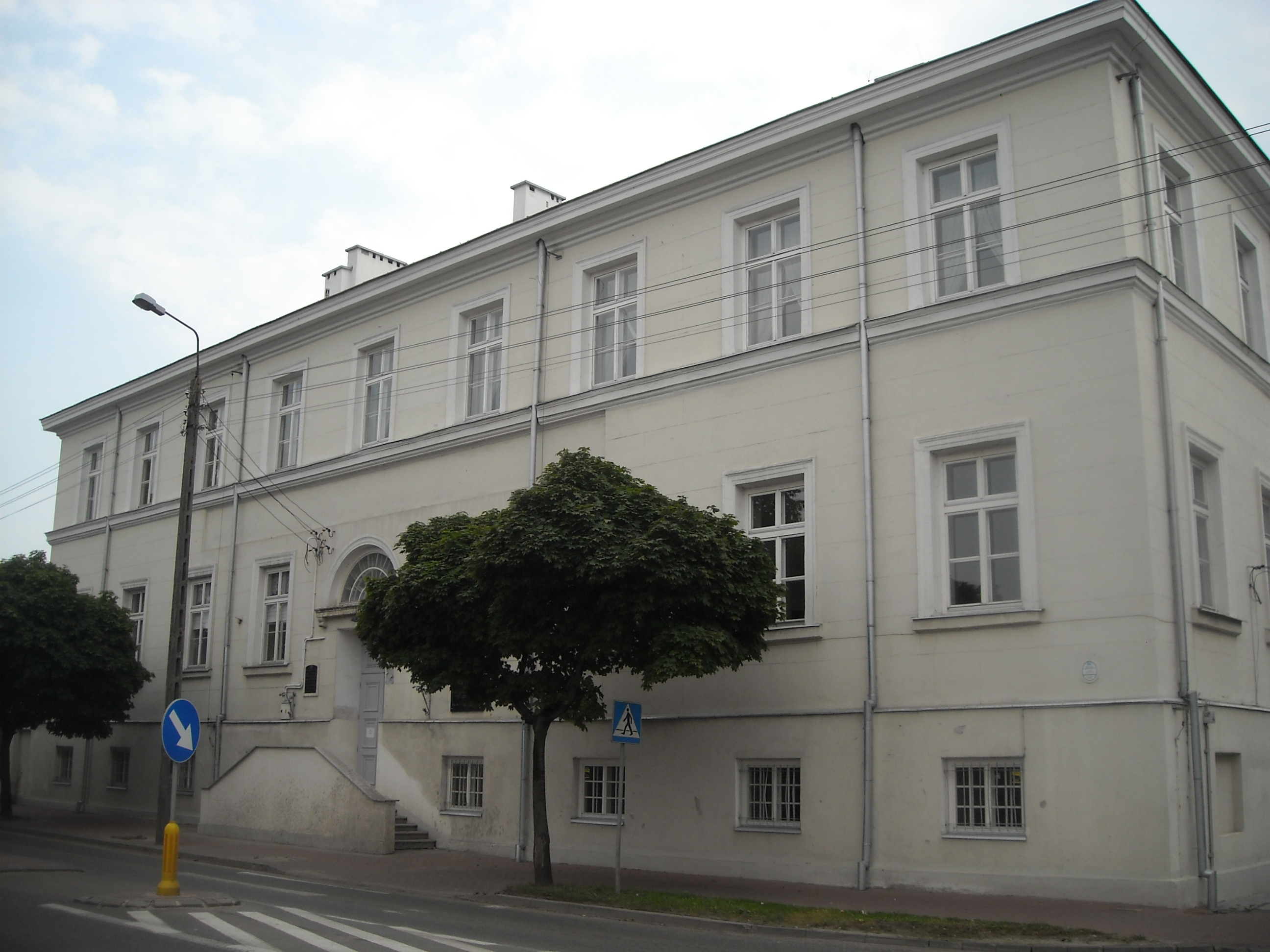 Radzymin. Gmach Liceum Ogólnokształcącego im. C.K. Norwida (dawny gmach Instytutu Nauczycieli Elementarnych, bud. 1843-1844) przy ulicy Konstytucji 3-go Maja 26.